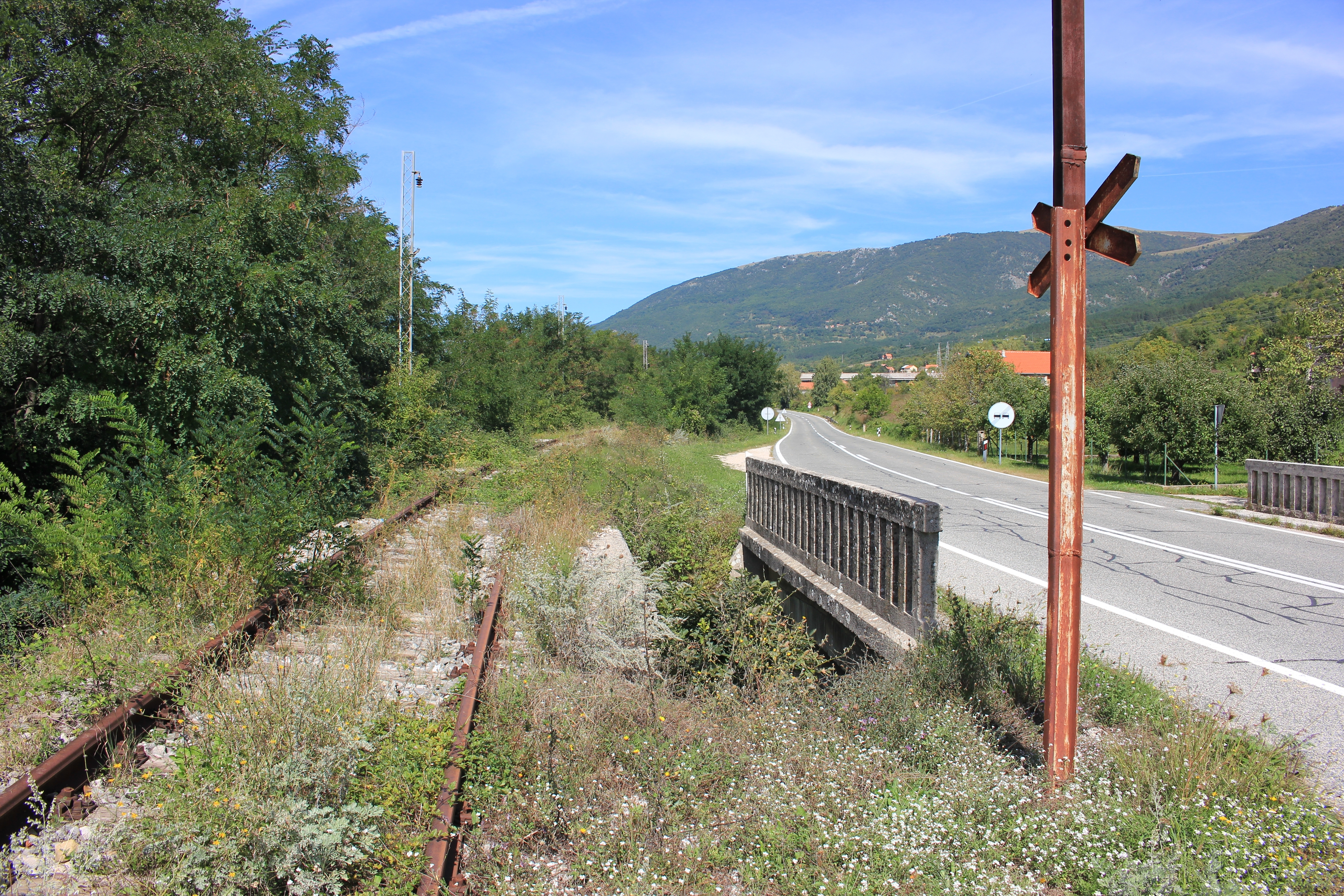 Unabahn bei Strmica, Kroatien.